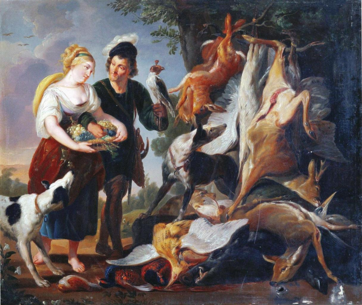 Jan Pieter Snyersin maalaus. Maalauksen omisti aikoinaan Viipurin taidemuseo, nykyään Hämeenlinnan taidemuseo.